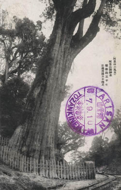 臺灣日據時代的阿里山神木明信片。